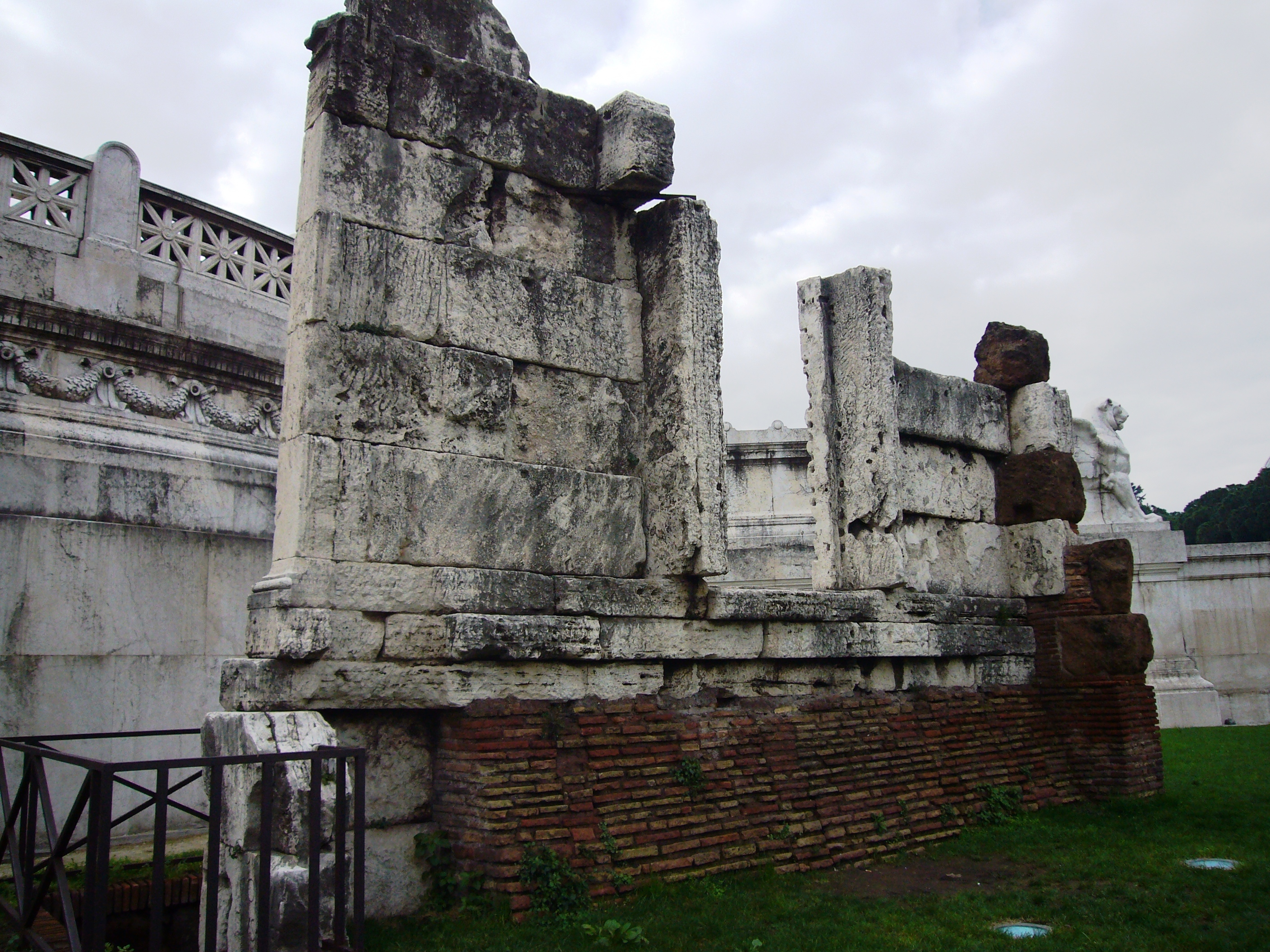 Roma, tomba di Publicio Bibulo sotto il Vittoriano